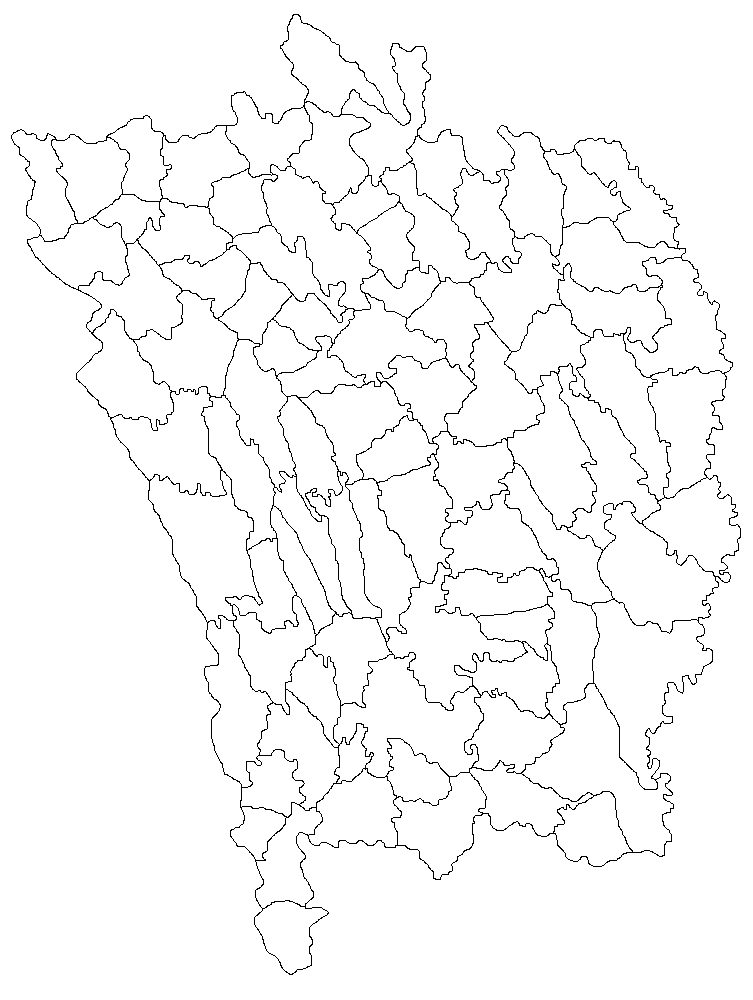 Categorie:Hărţi ale judeţului Vaslui